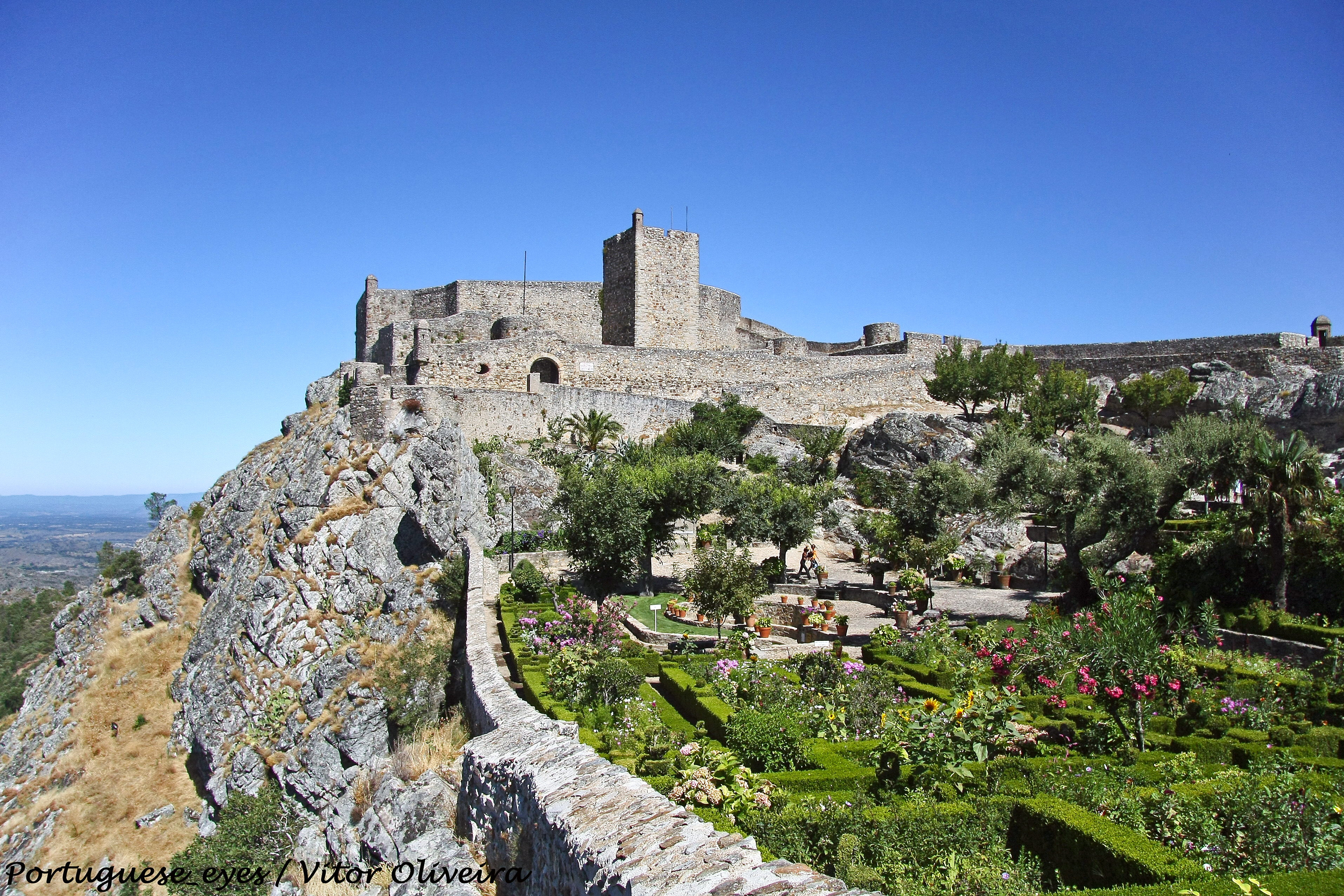 O Castelo de Marvão é constituído por uma imponente muralha, onde se encerra a pitoresca vila típica e monumental, de casco muito antigo, e o castelo propriamente dito, situado no ponto mais alto do esporão rochoso, em permanente vigília sobre um território fronteiriço. D. Afonso Henriques terá tomado a fortaleza aos mouros em 1166. A sua excelente posição estratégica na linha de defesa da fronteira valeu-lhe as atenções de inúmeros monarcas materializadas em grandes obras de remodelação, algumas das quais ainda hoje detectáveis. D. Sancho II concedeu-lhe foral em 1226 com o intuito de manter este ponto avançado povoado e, deste modo, protegido dos inúmeros ataques vindos de Espanha. Mas terá sido D. Dinis quem empreendeu as primeiras grandes obras de ampliação e remodelação. Data dessa altura - 1300 - a construção da torre de menagem. Anos mais tarde, durante a Guerra da Restauração, o castelo foi reconstruído numa linguagem arquitectónica a que parecem não ter sido alheias, para além das intenções primordiais de cariz militar, outras, poderemos dizer estéticas, patentes na volumetria então desenvolvida. Adossada à Torre de Menagem ainda hoje subsiste uma alta muralha, interior, que envolve o terreiro. Esta estrutura é ainda envovida por uma segunda linha de muralha reforçada com torreões e ameias. A barbacã é o início de uma extensa linha defensiva que coroa o monte e envolve e protege a vila. See where this picture was taken. [?]